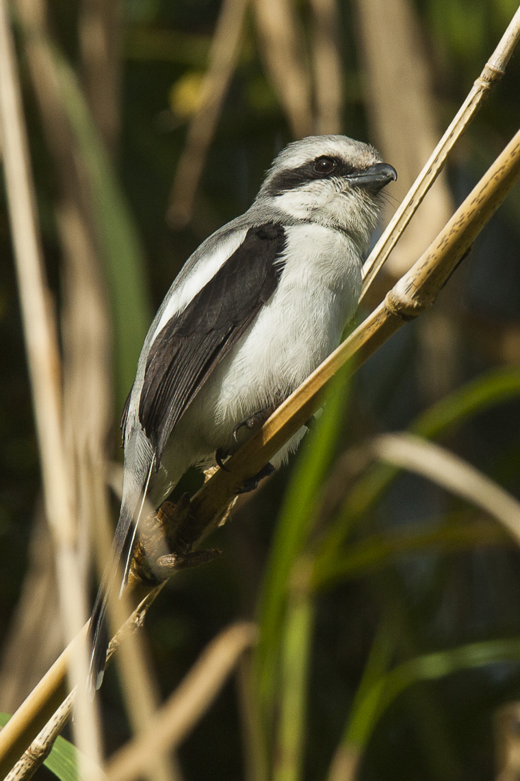 Mackinnon's Shrike - Uganda_H8O3871